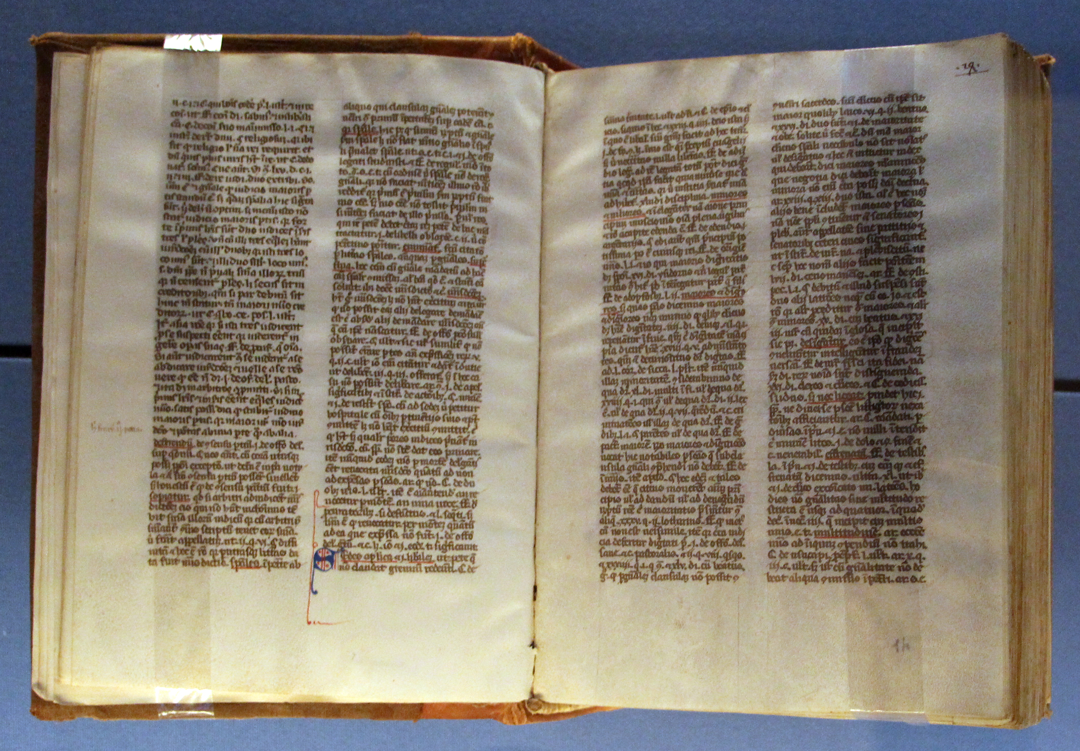 Biblioteca Medicea Laurenziana